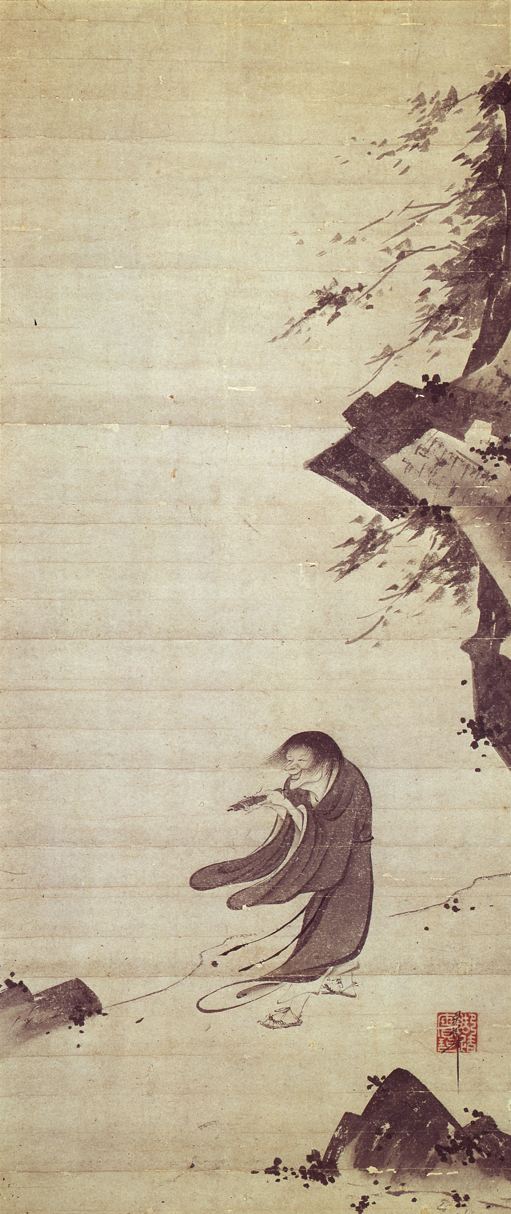 Le Moine Kanzan est une œuvre peinte par le peintre japonais Reisai du XVe siècle. C'est une encre sur papier de 83,9x35,5 centimètres. Elle est conservée au musée Gotoh de Tokyo.